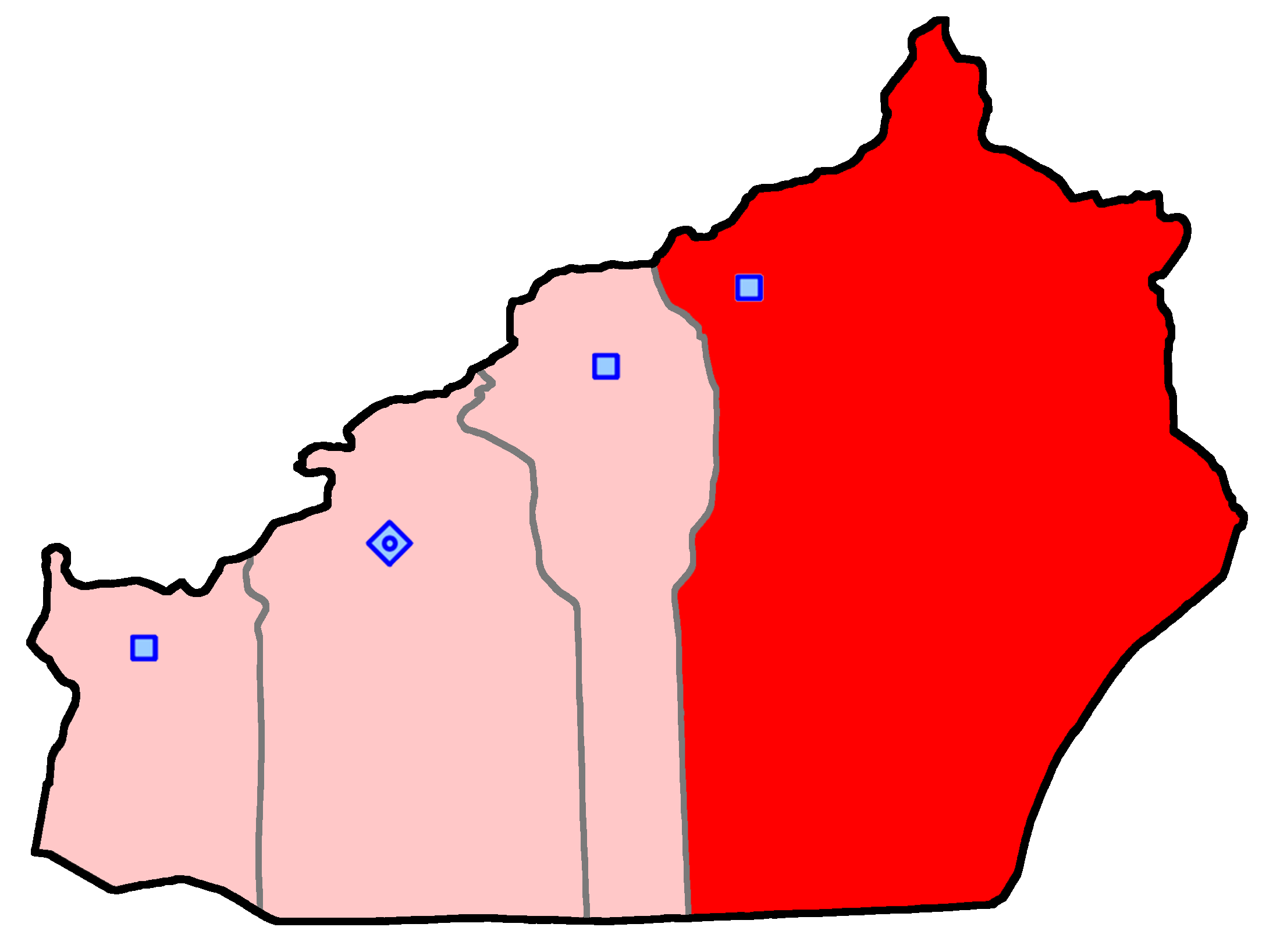 =حوزهٔ انتخاباتی شاهرود برای انتخابات مجلس شورای اسلامی